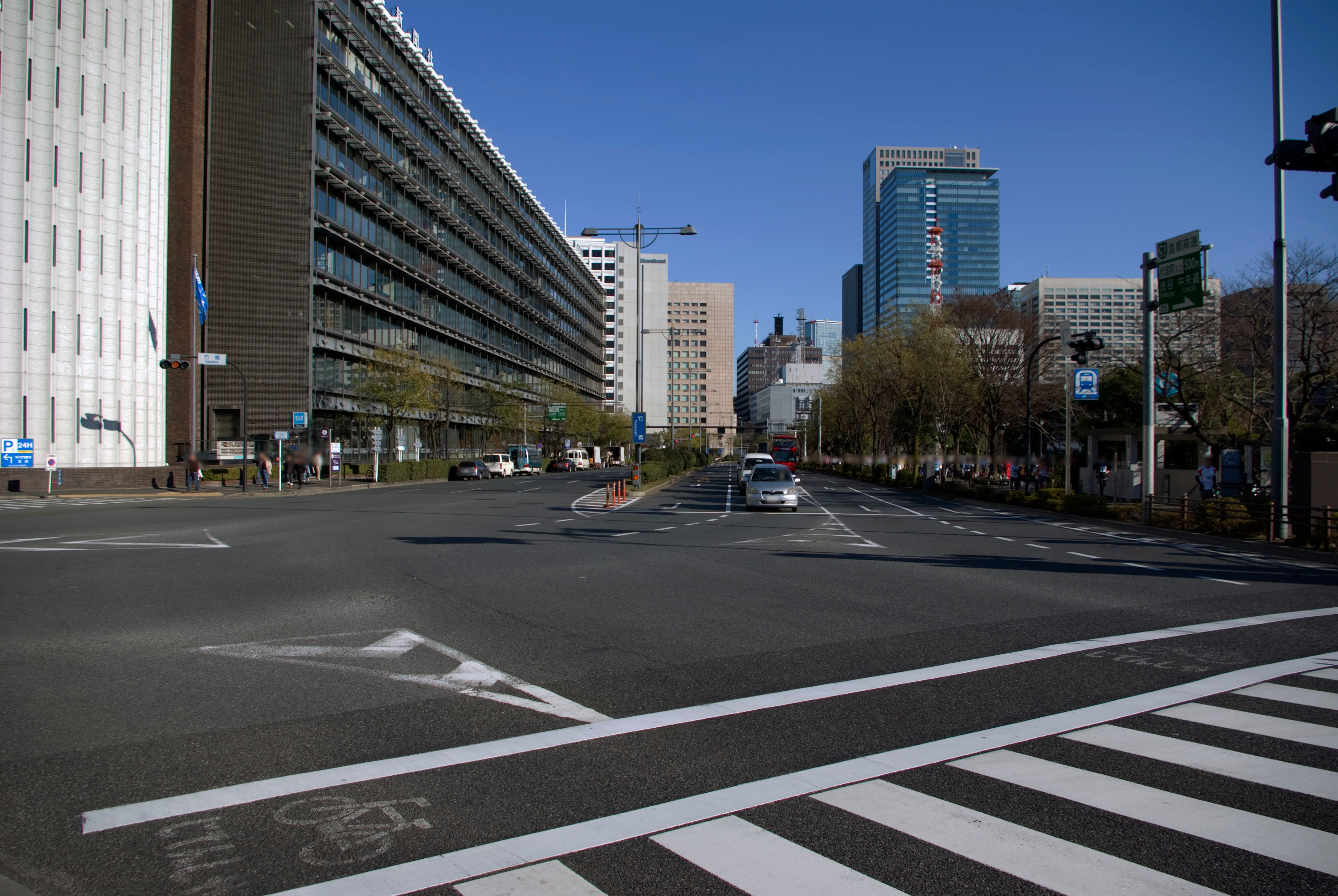 東京地下鉄東西線竹橋駅